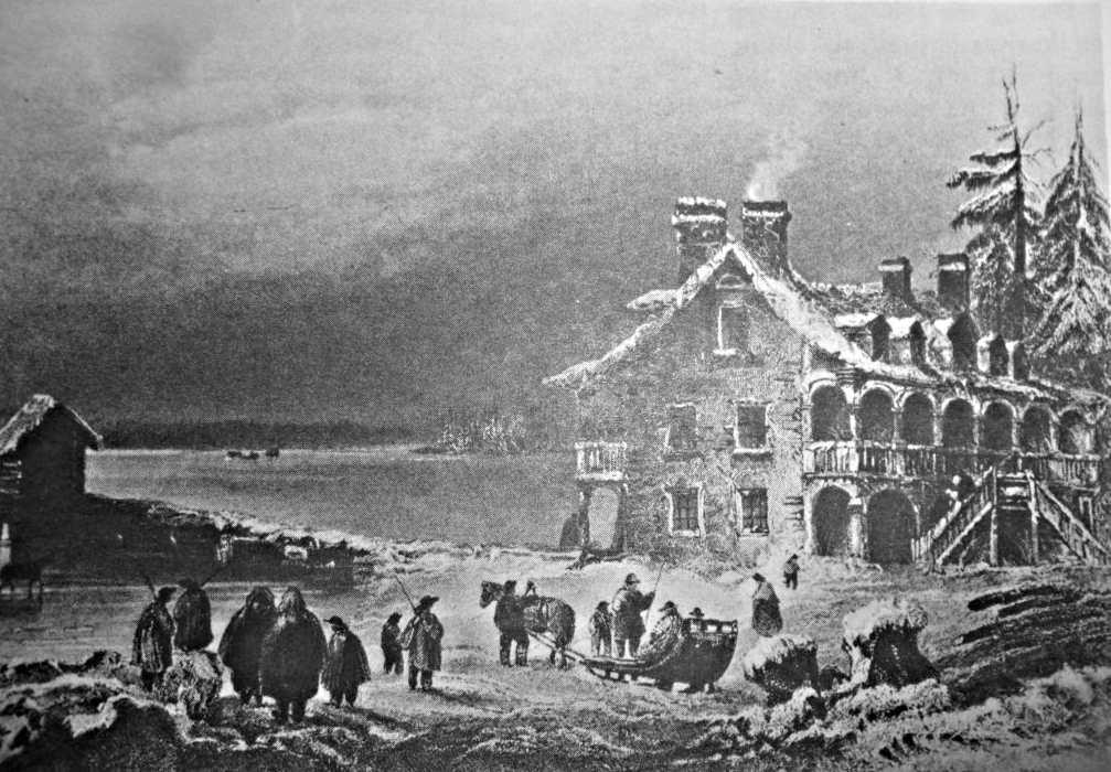 Reproduction de la peinture de l'auberge Symmes par W.H Bartelett de 1841